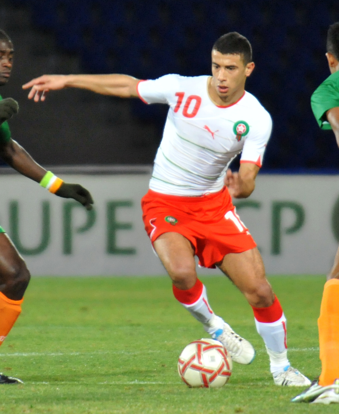 Younès Belhanda, Maroc-Niger (09/02/2011).